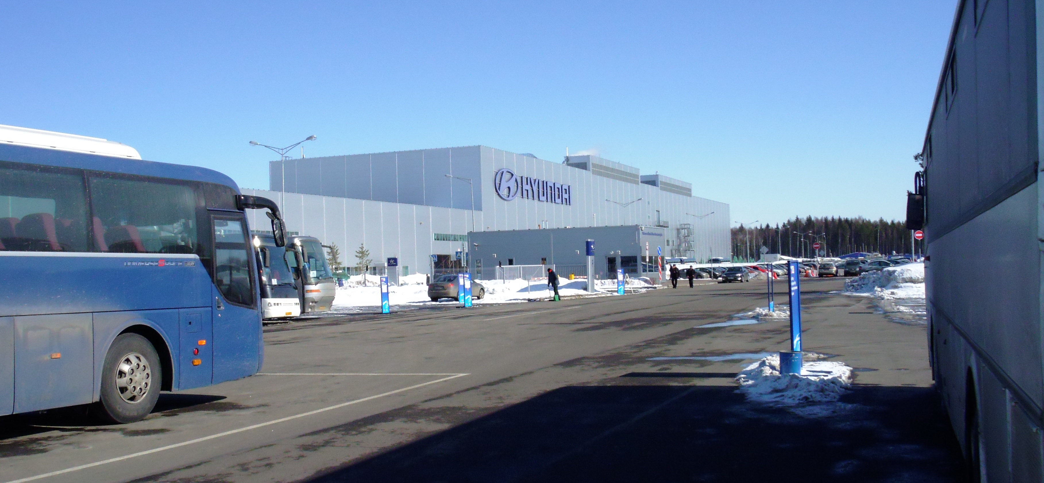 Сестрорецк СПб автозавод "Хёндэй"